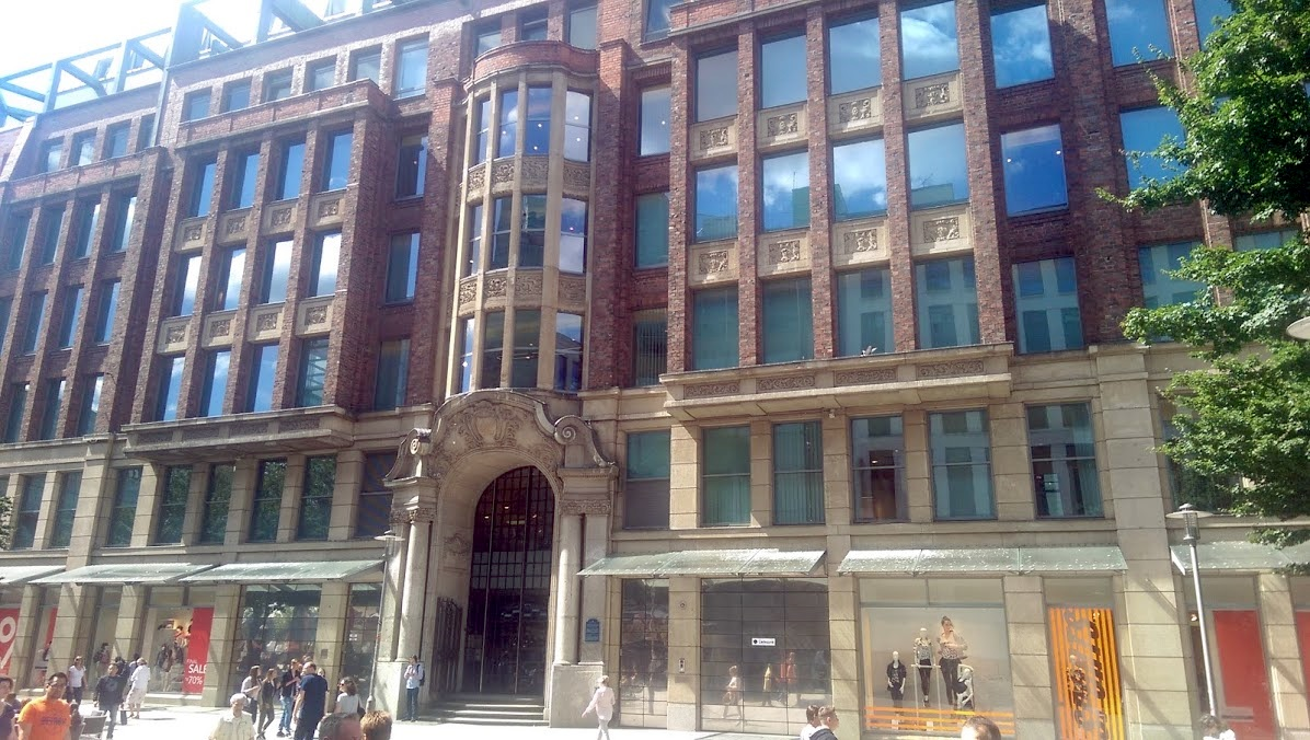 Südseehaus Hamburg